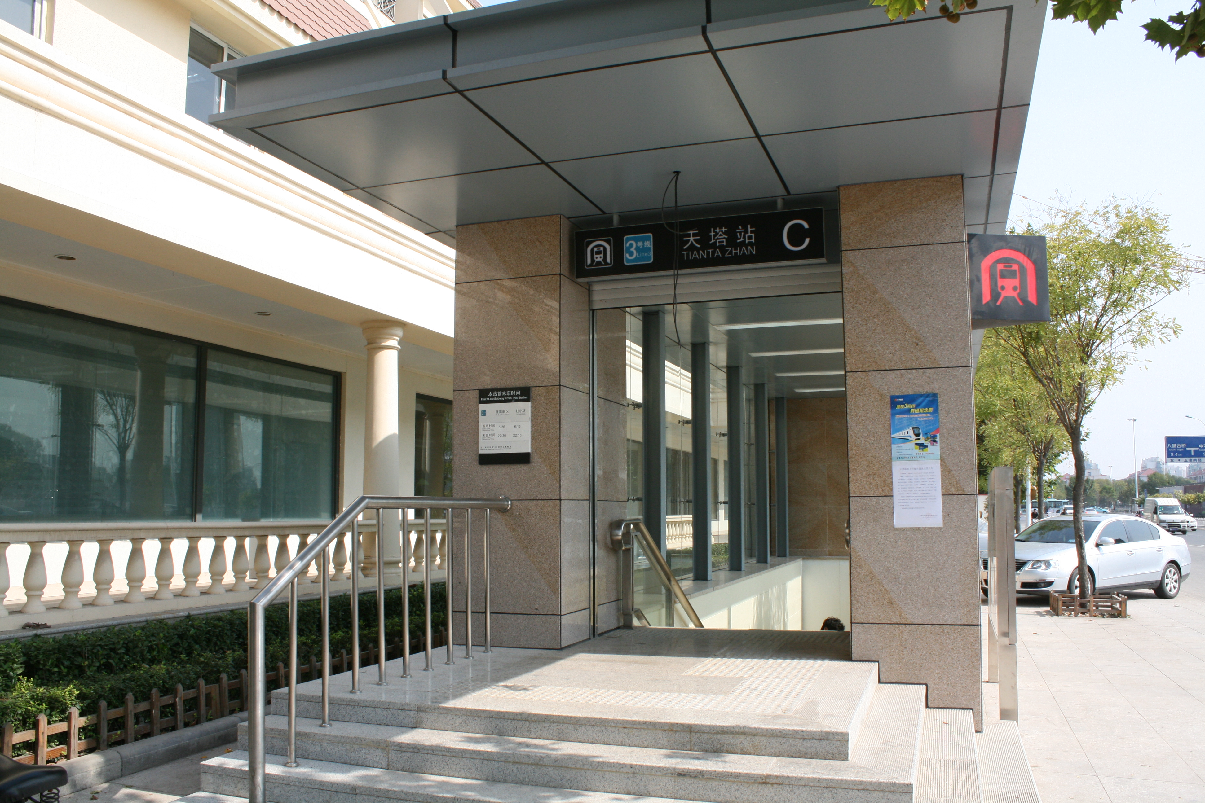 天津地鐵三號線天塔站C出口